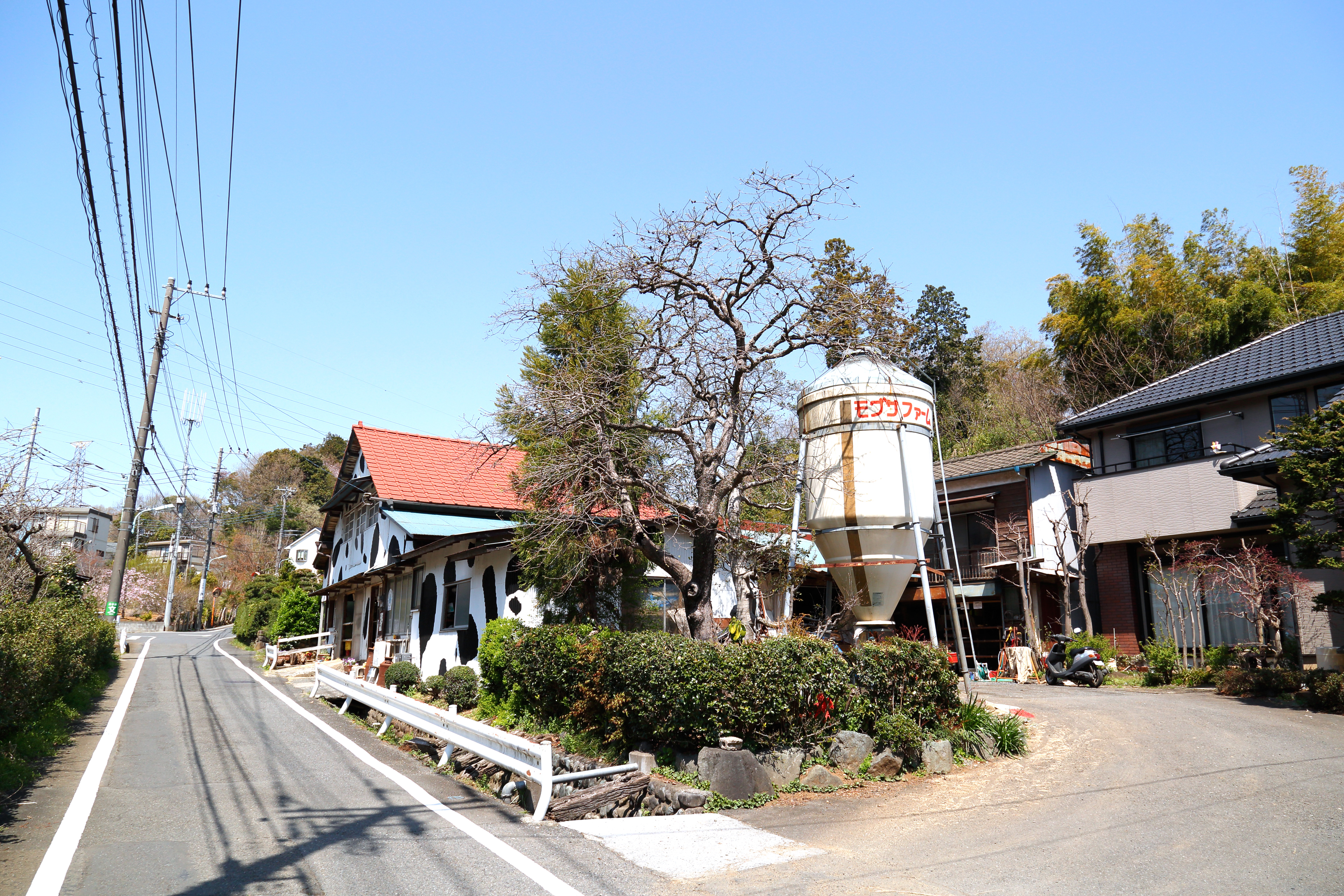 日野市百草にある市内唯一のja:酪農。